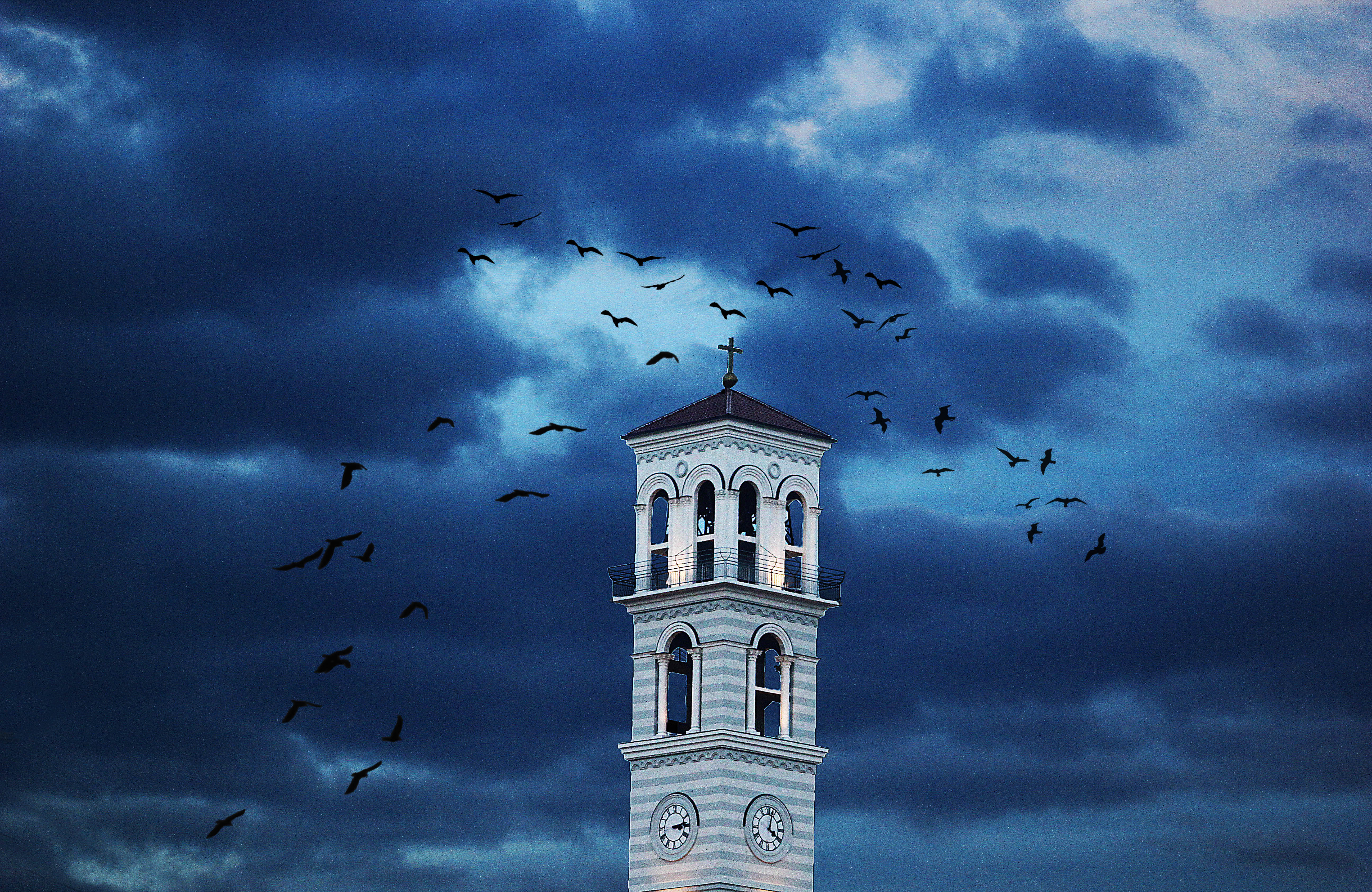 Pamje e katedrales së re në Prishtinë